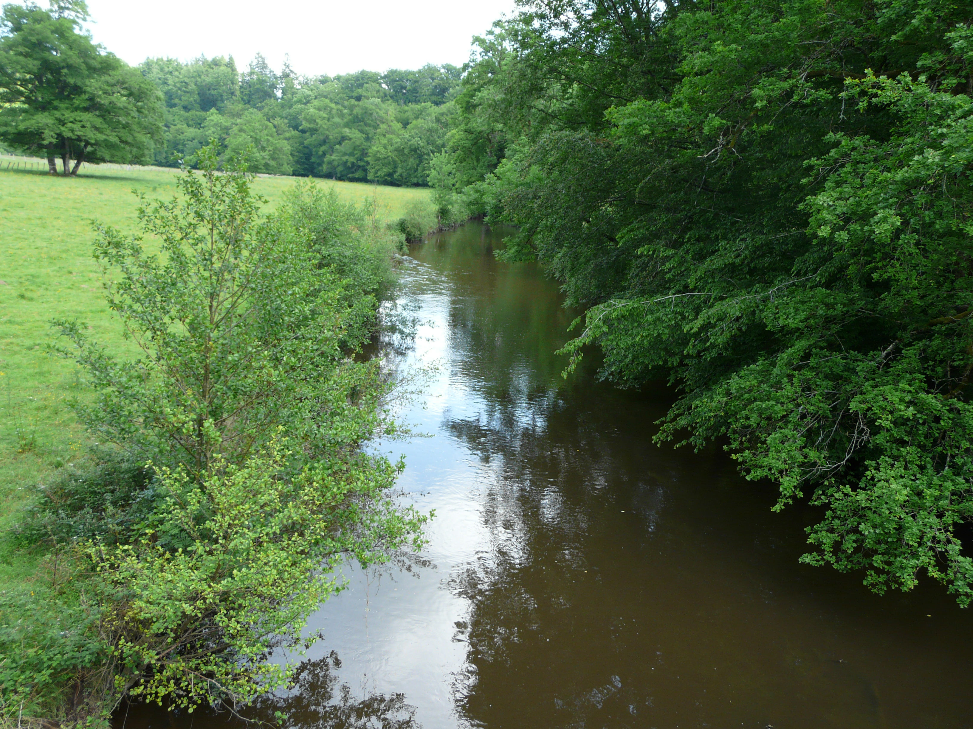 La Tardoire en amont du pont qui relie la route départementale (RD) 112 (commune d'Écuras, en Charente à gauche) et la RD 3 (commune de Bussière-Badil, en Dordogne à droite).